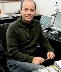 imagen